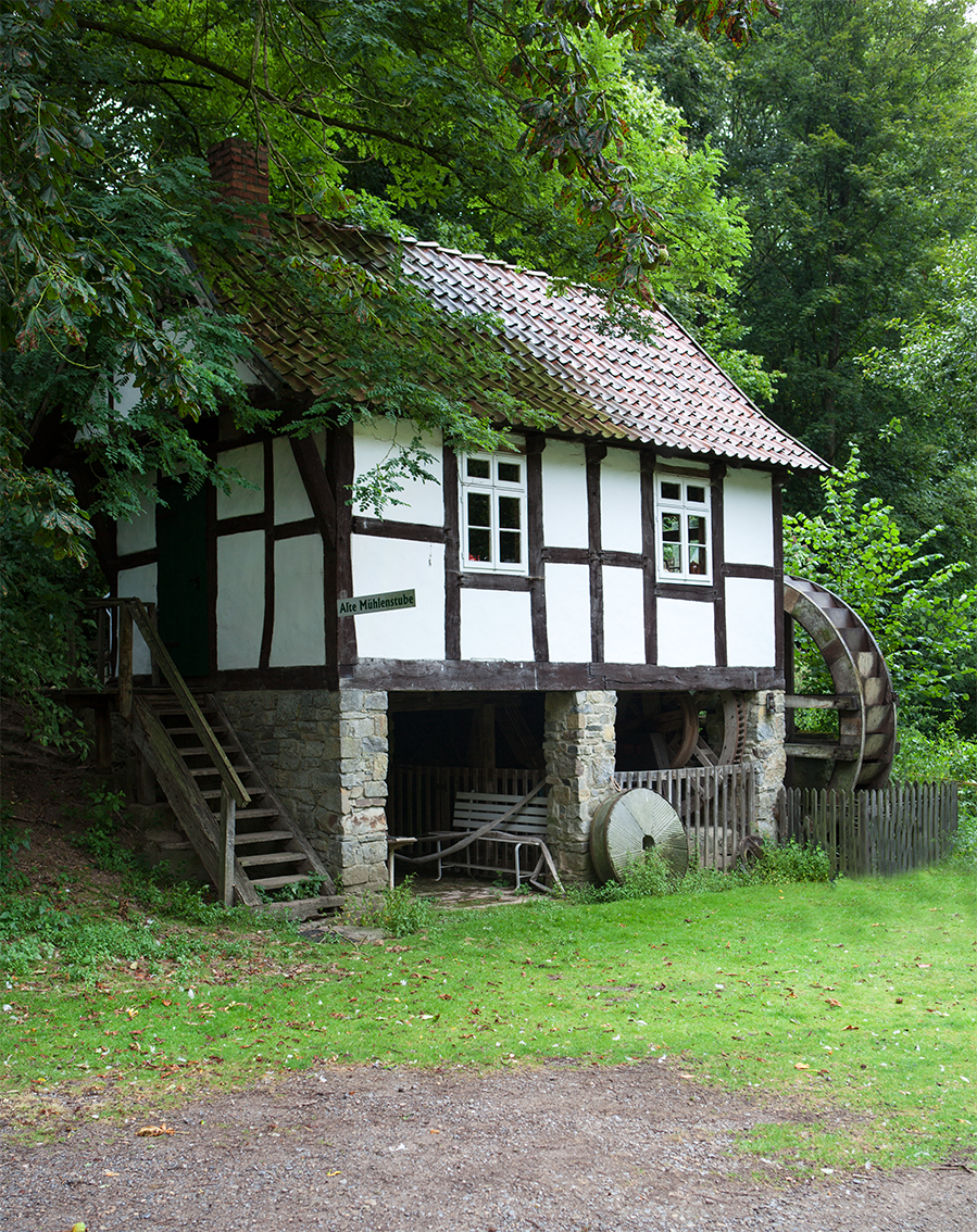 Hohenhausen-Dalbke, Wassermühle, Hofanlage Klemme This is a photograph of an architectural monument.